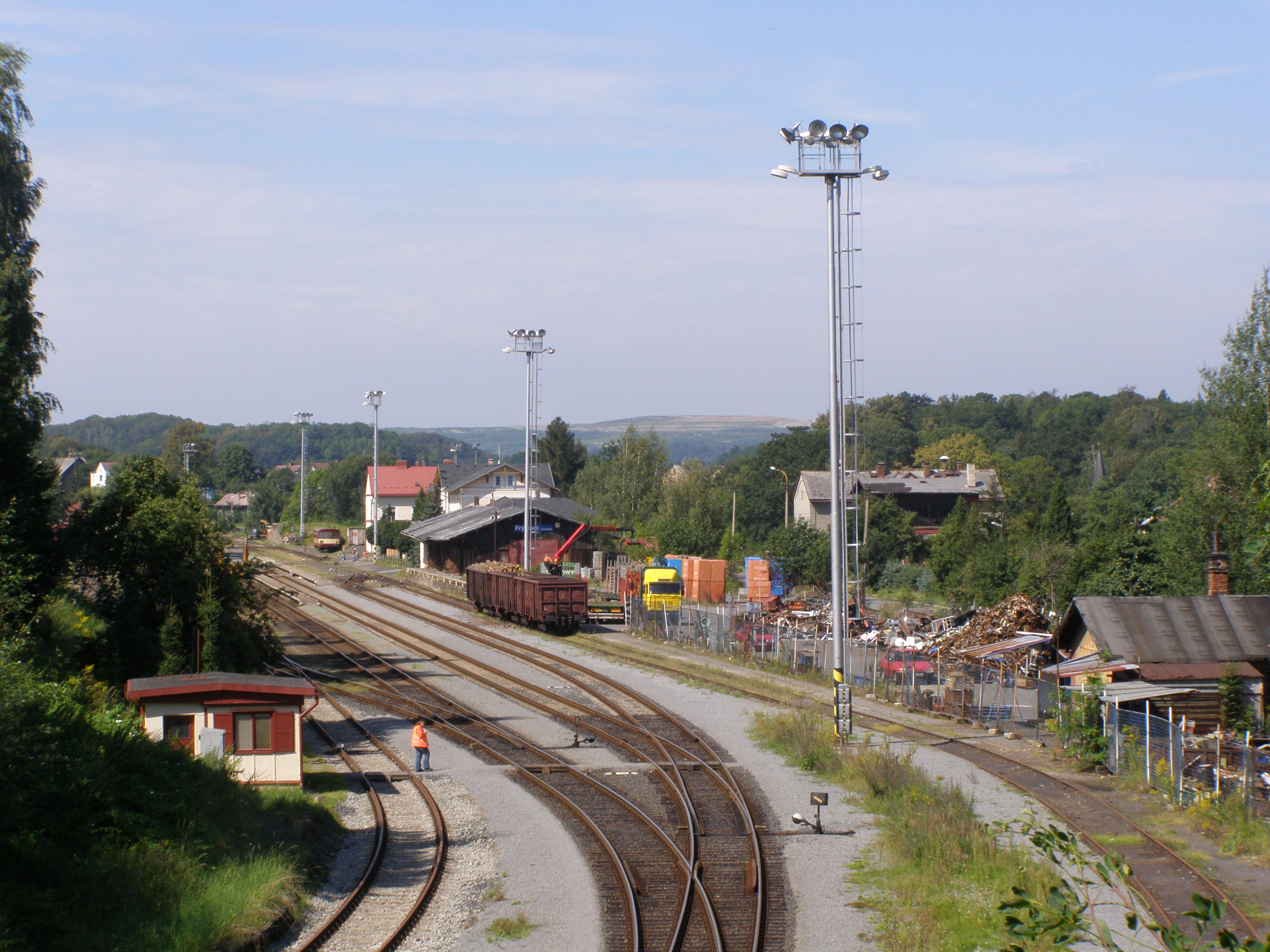 Frýdlant, nádraží